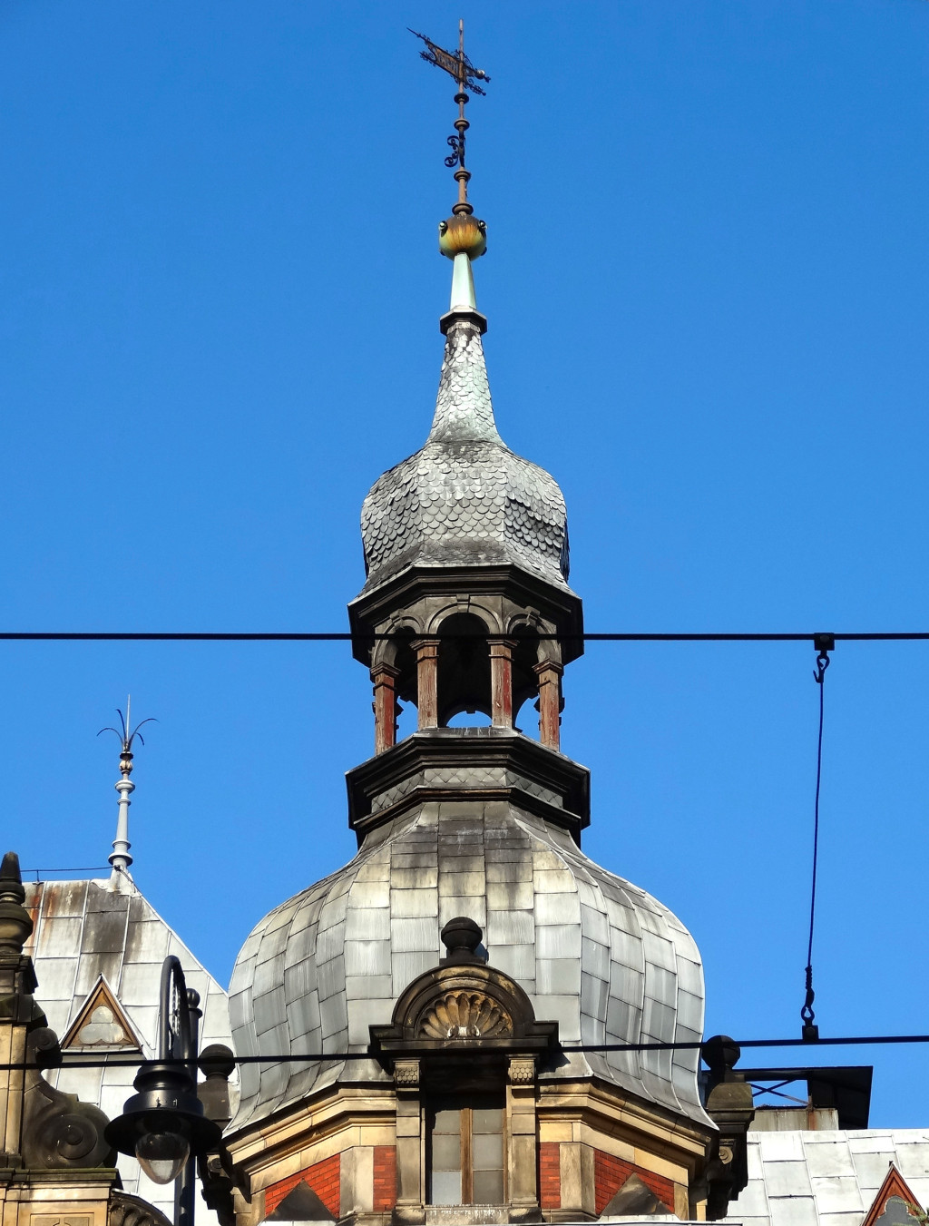 Budynek dawnej dyrekcji Kolei Wschodniej w Bydgoszczy, ul. Dworcowa 63, zbud. 1886-1889, od 2013 r. w gestii Collegium Medicum UMK